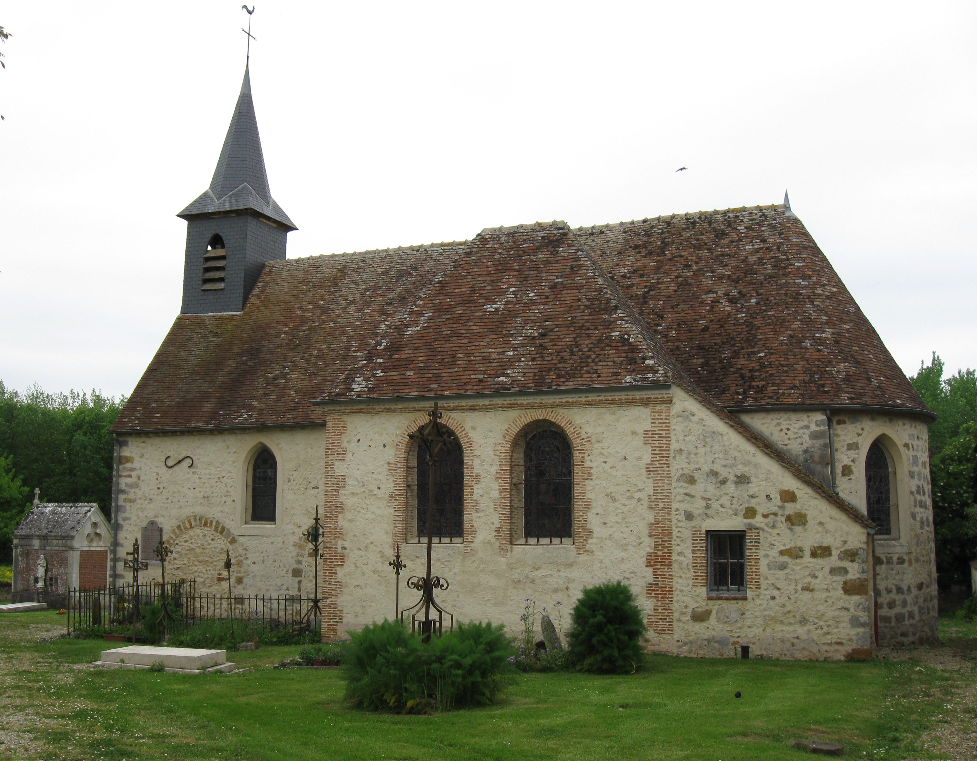 Église Notre-Dame de Sigy. (Seine-et-Marne, région Île-de-France).